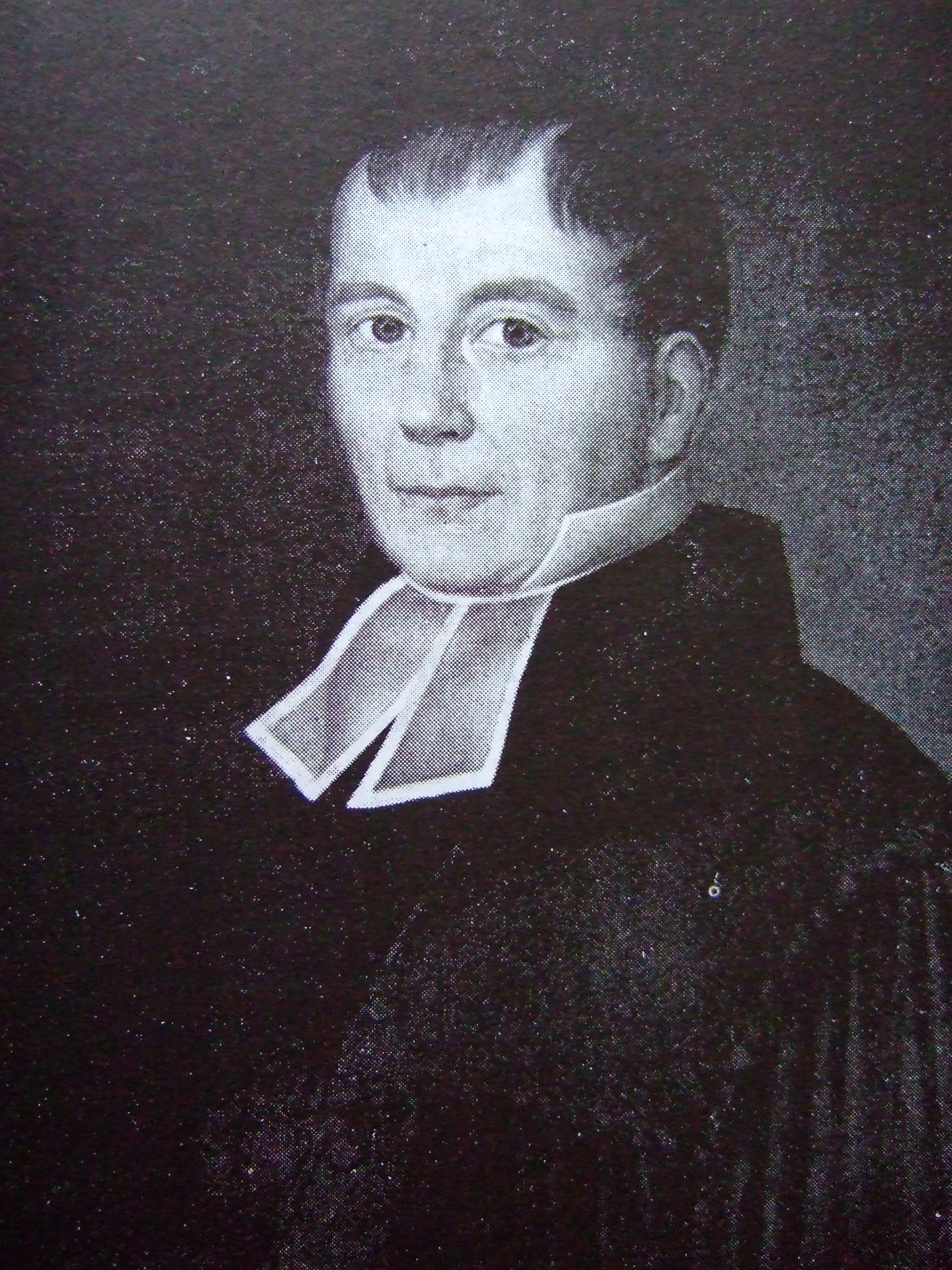 Porträt des ersten Pfarrers an der neuen Evangelischen Kirche zu Monschau (1789-1840); entnommen aus: Walter Scheibler: Geschichte der Evangelischen Gemeinde Monschau, Aachen 1939, S. 251.